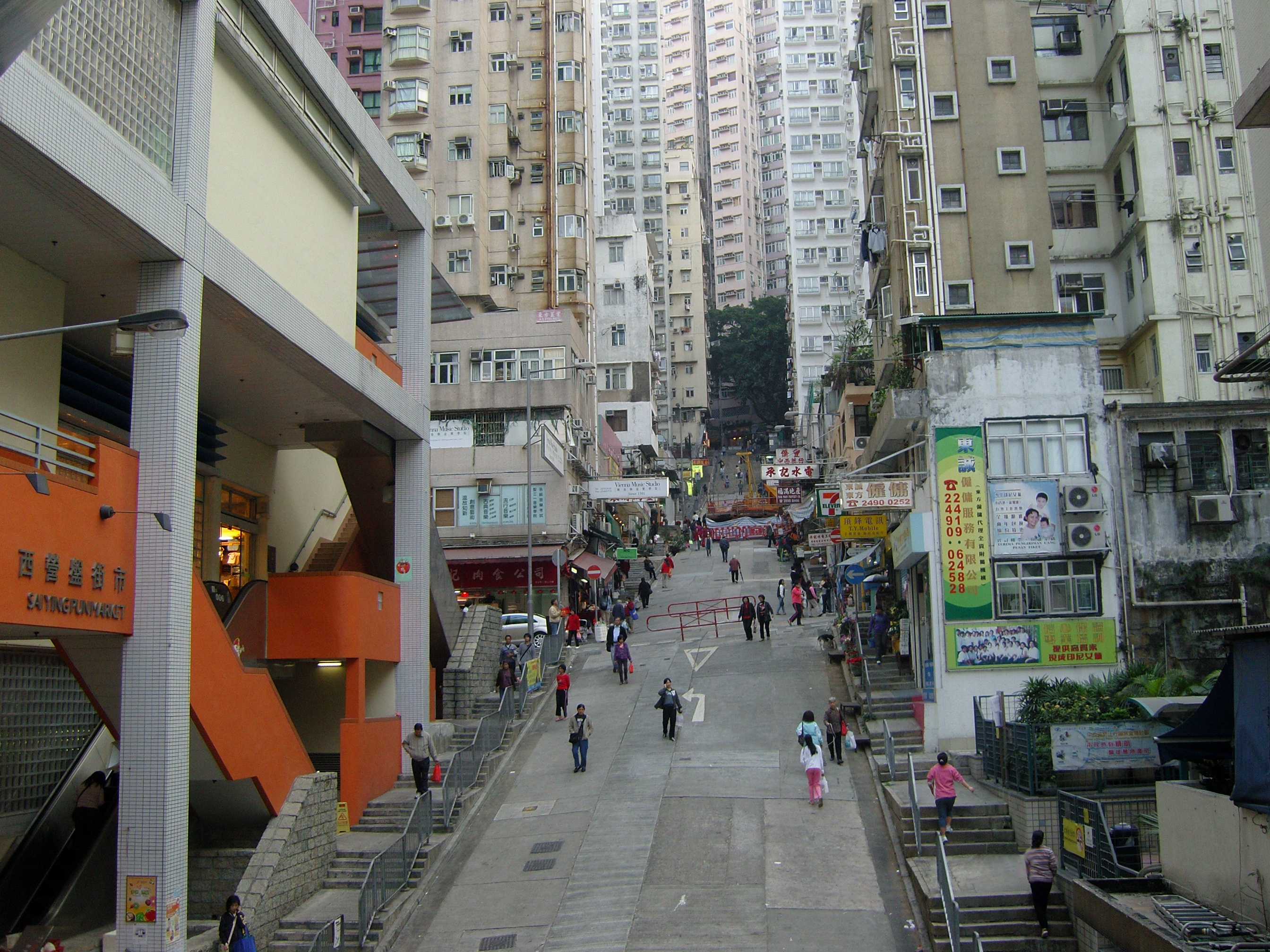 中文（香港）: 正街近西營盤街市一段